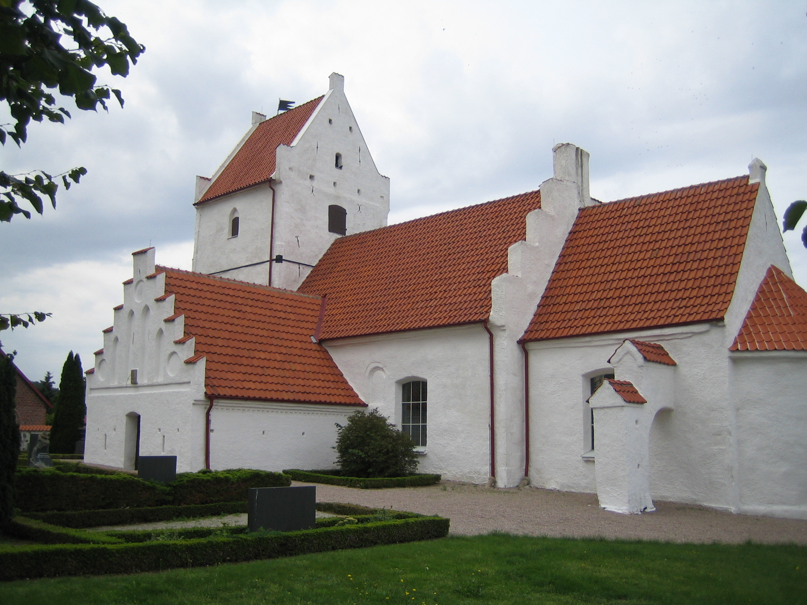 Törringe kyrka